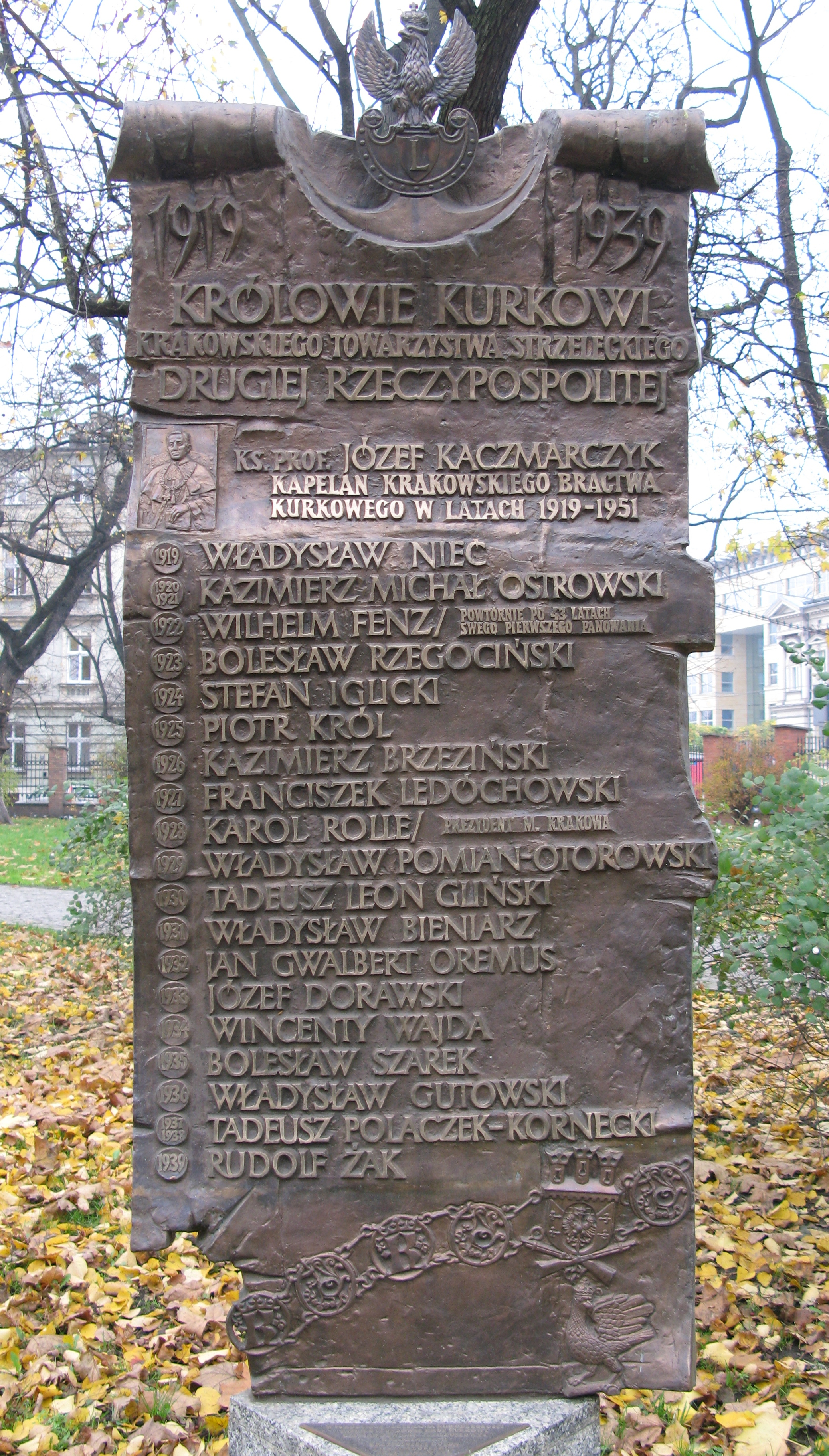 Tablica pamiątkowa w Parku Strzeleckim w Krakowie